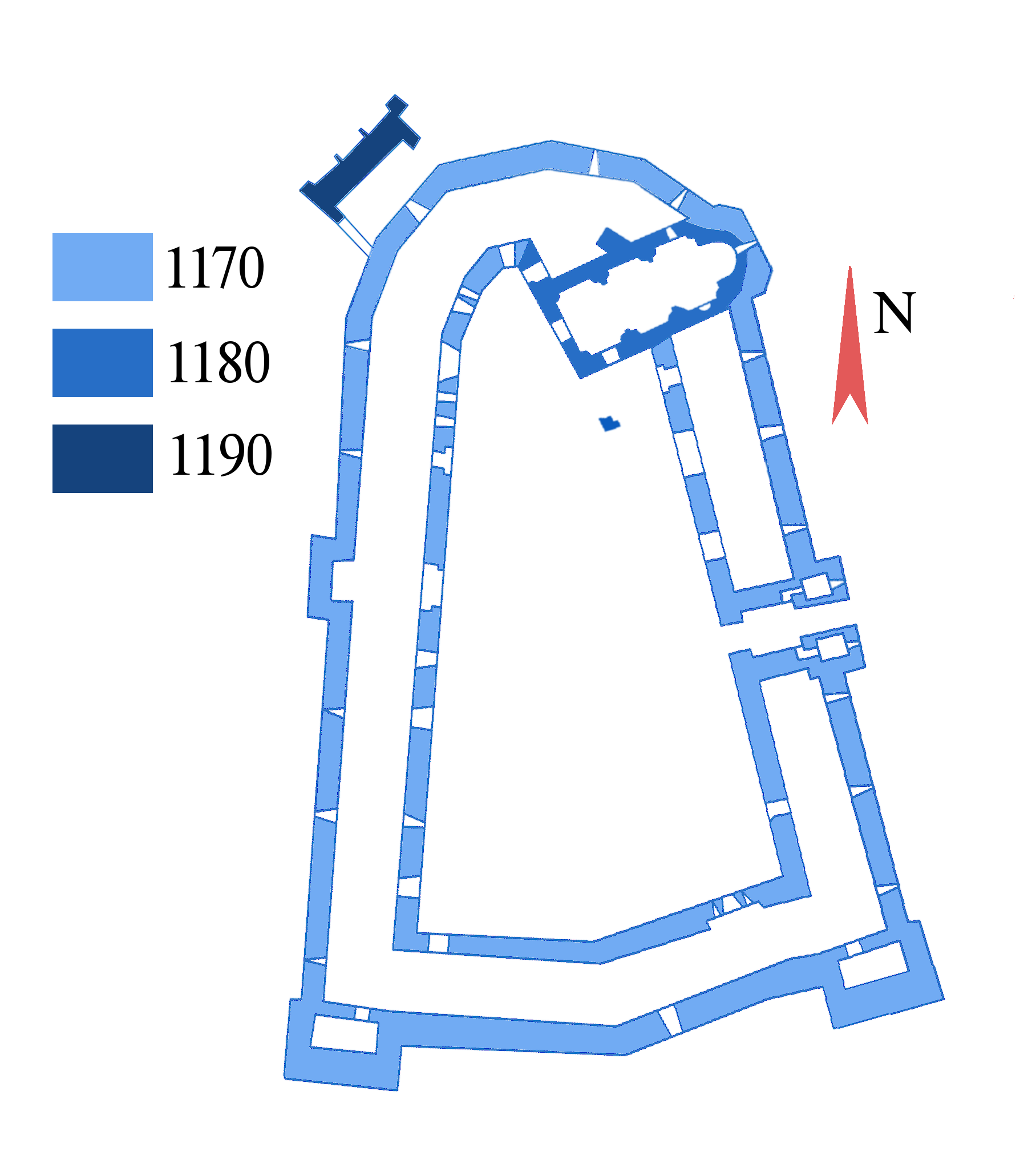 comme son nom l'indique :)